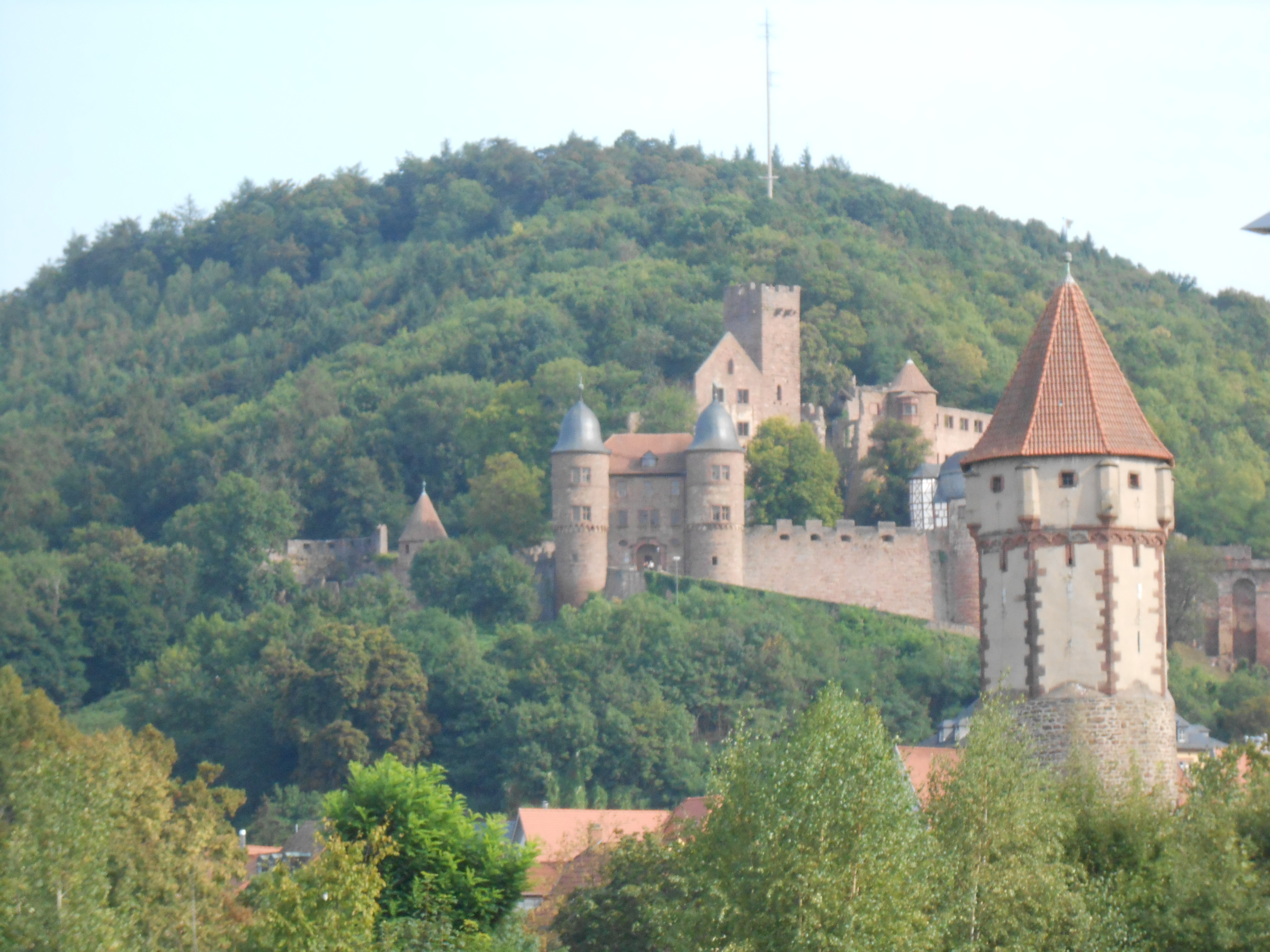 Schloss Wertheim